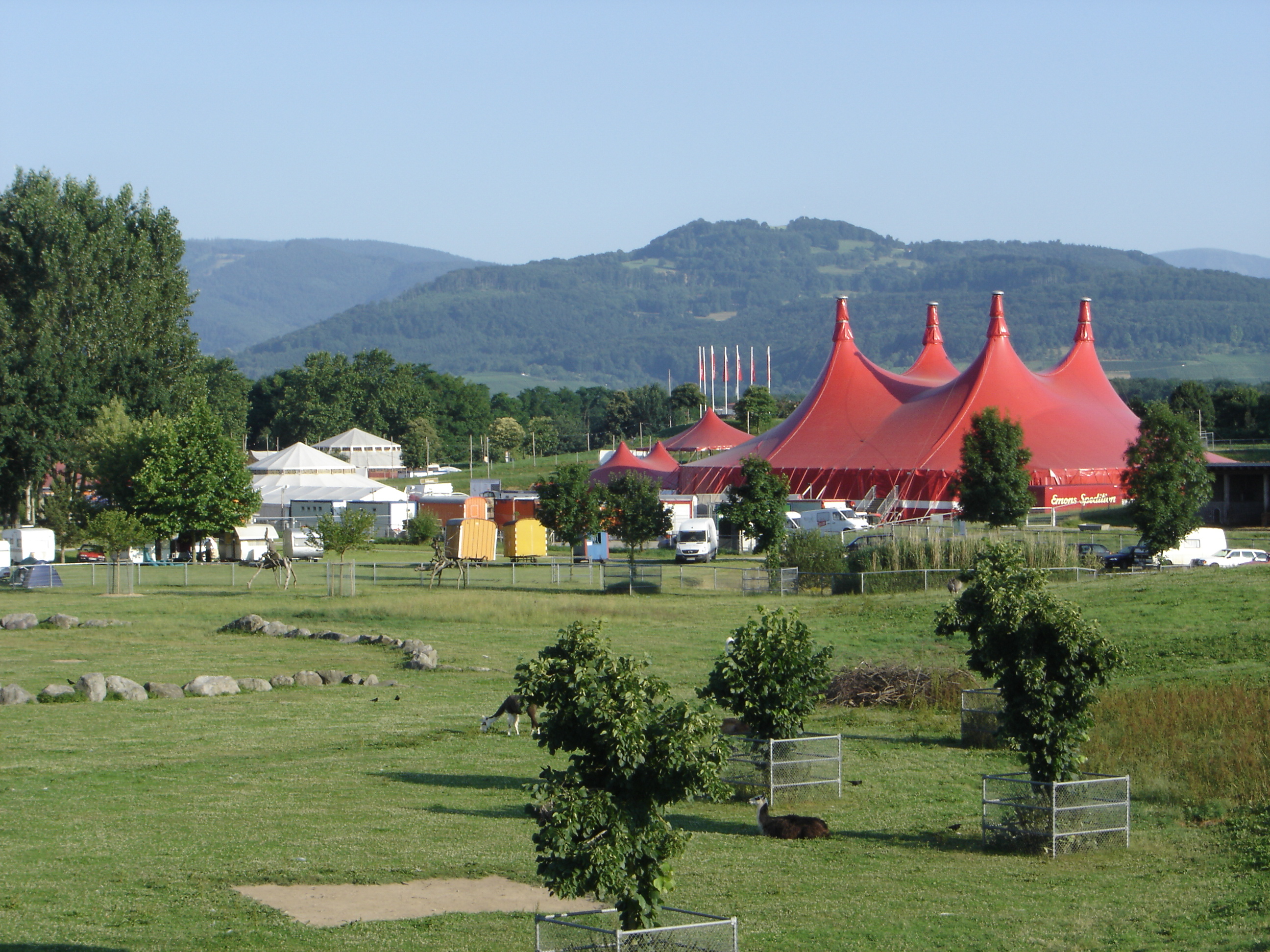 Das Gelände des Zelt Musik Festivals vom Mundenhof gesehen, im Hintergrund der Schönberg